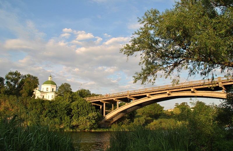 Міст через р.Рось у Білій Церкві